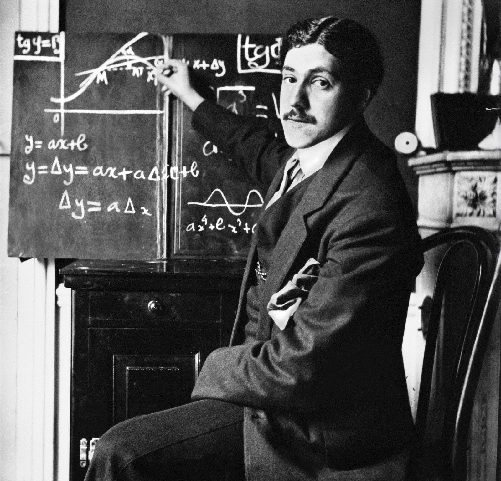 مارسيل داسولت